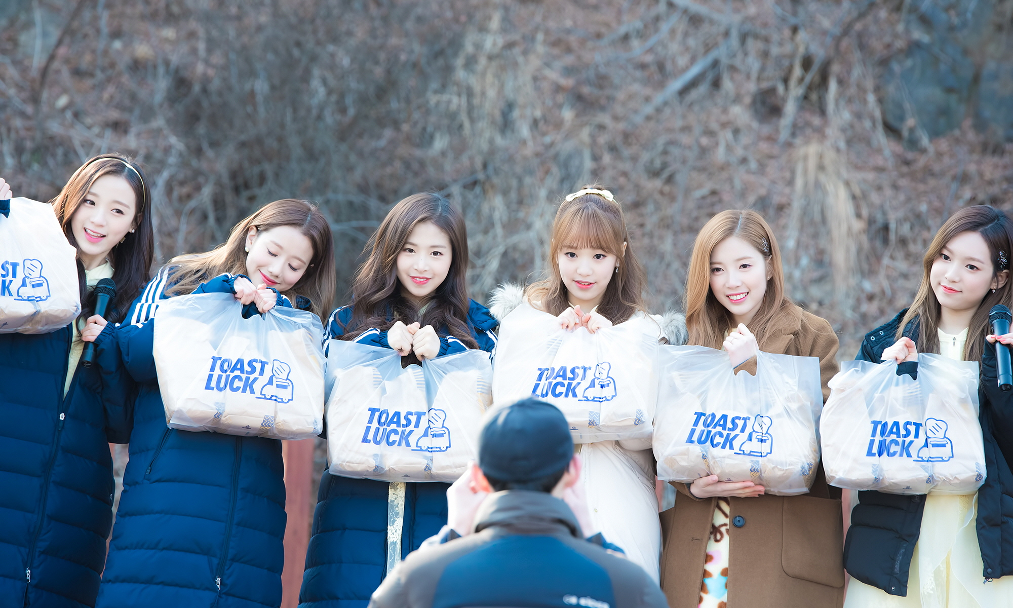 170226 에이프릴 미니팬미팅